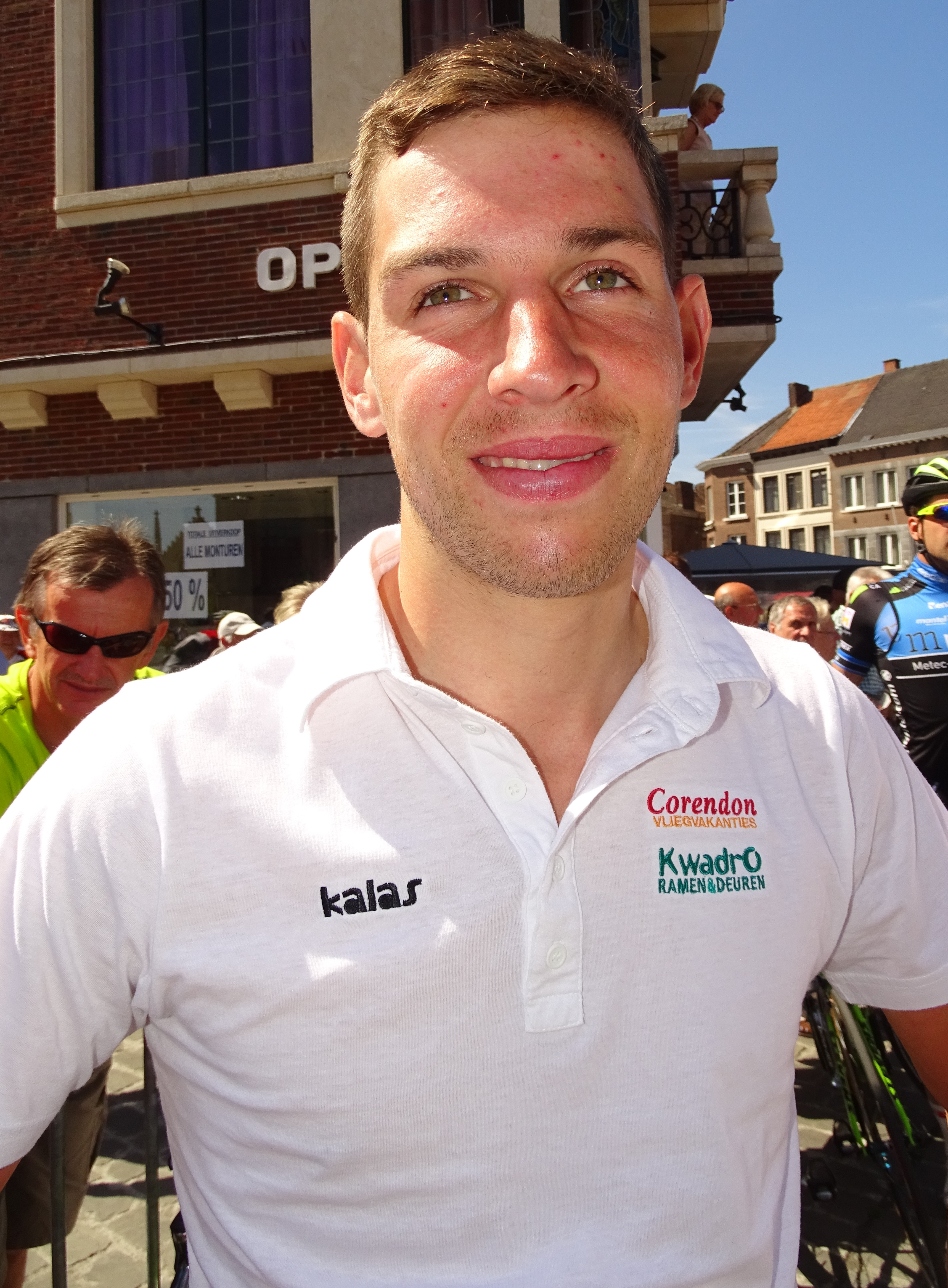 Reportage réalisé le dimanche 14 juin à l'occasion du départ et de l'arrivée du Tour du Limbourg 2015 à Tongres, Belgique.